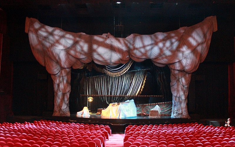 Сцена «Театра МДМ»: декорации первой сцены мюзикла «Призрак Оперы».